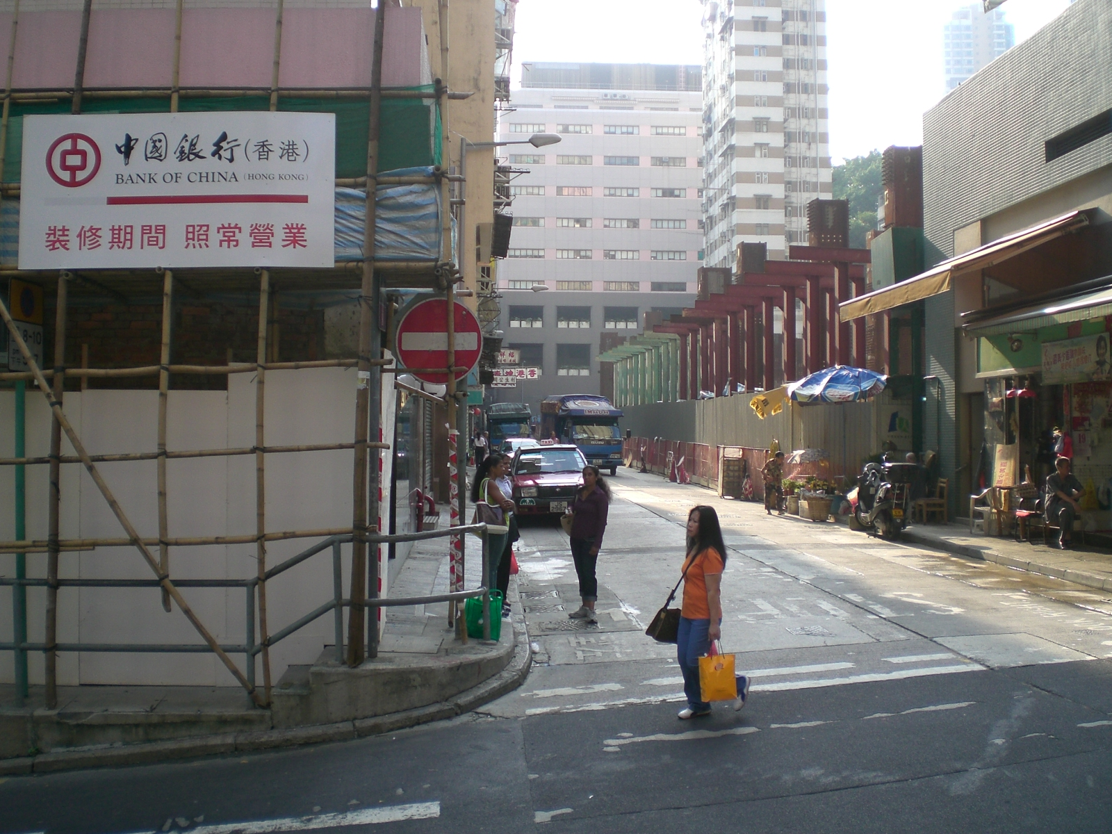 第一街, First Street, Sai Ying Pun, Hong Kong.